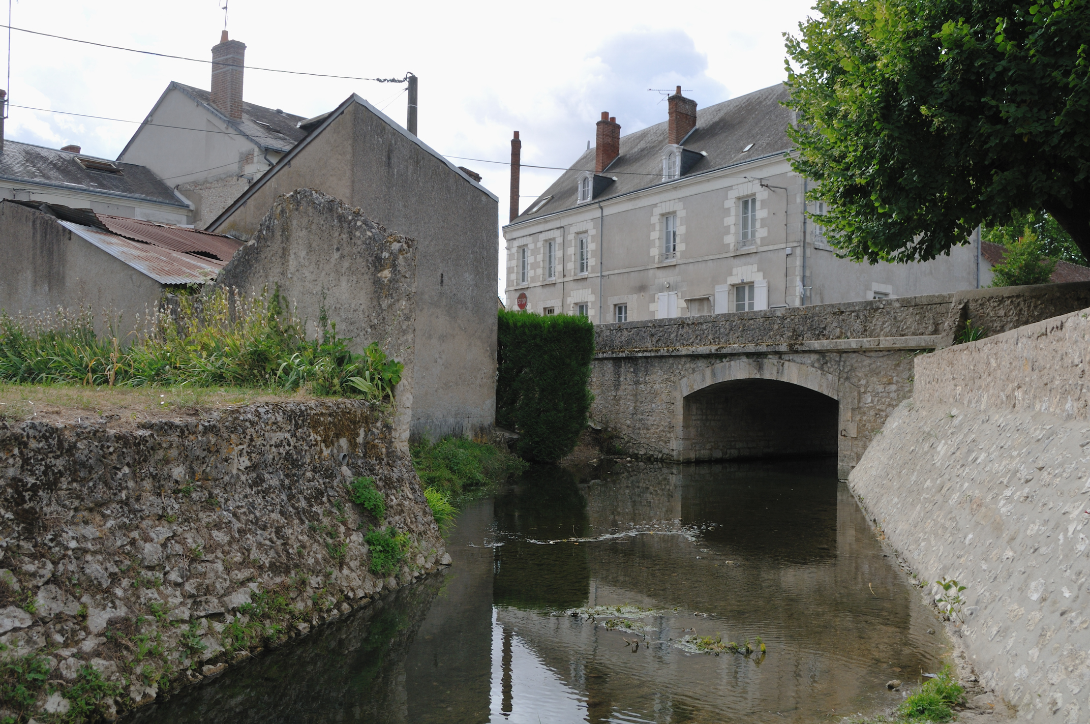 La Cisse, Onzain, Loir-et-Cher, France